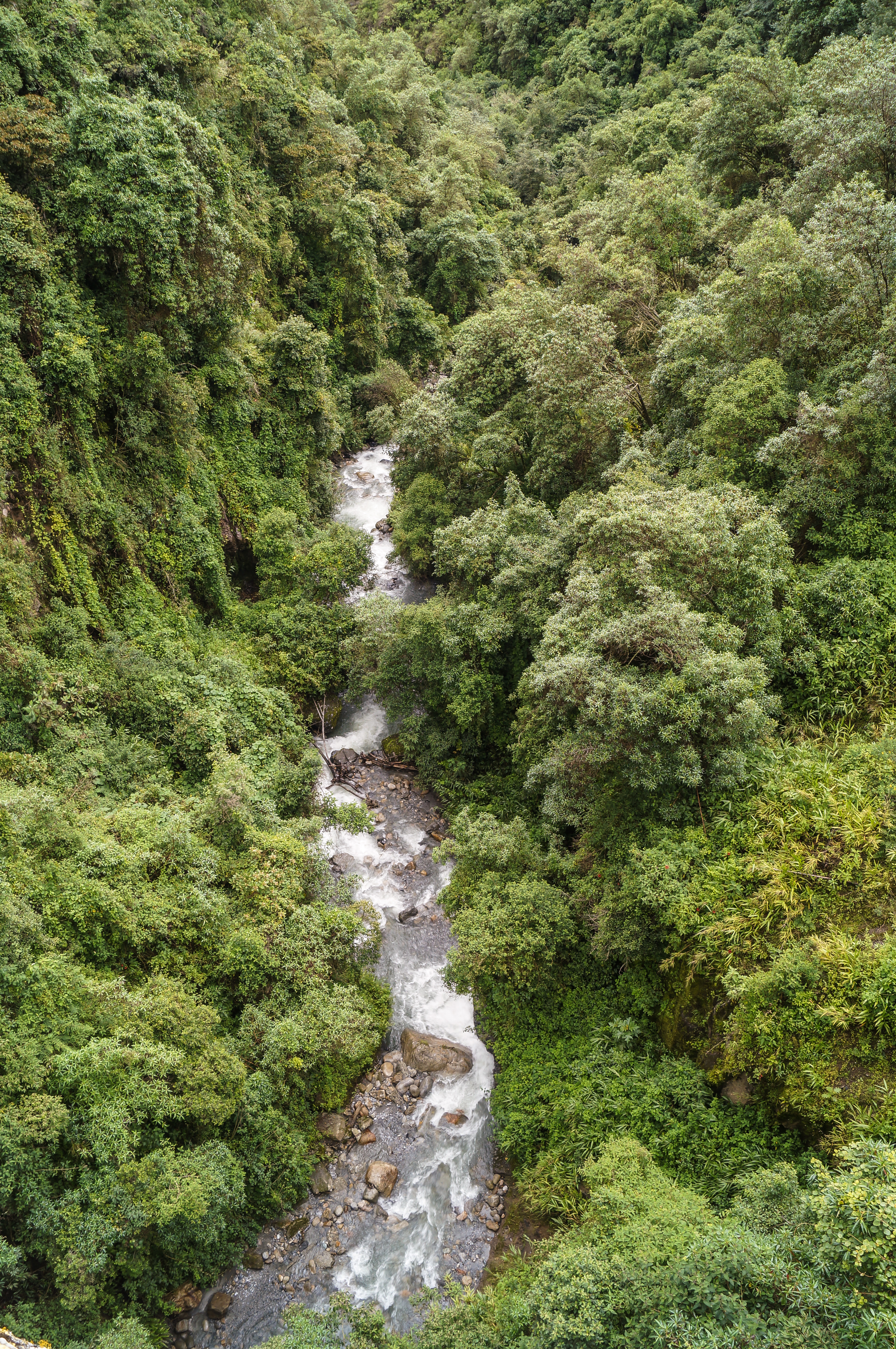 Vista del Río Burate desde el Viaducto Agrícola Batalla de Niquitao, es un afluente del río Boconó. Trujillo.